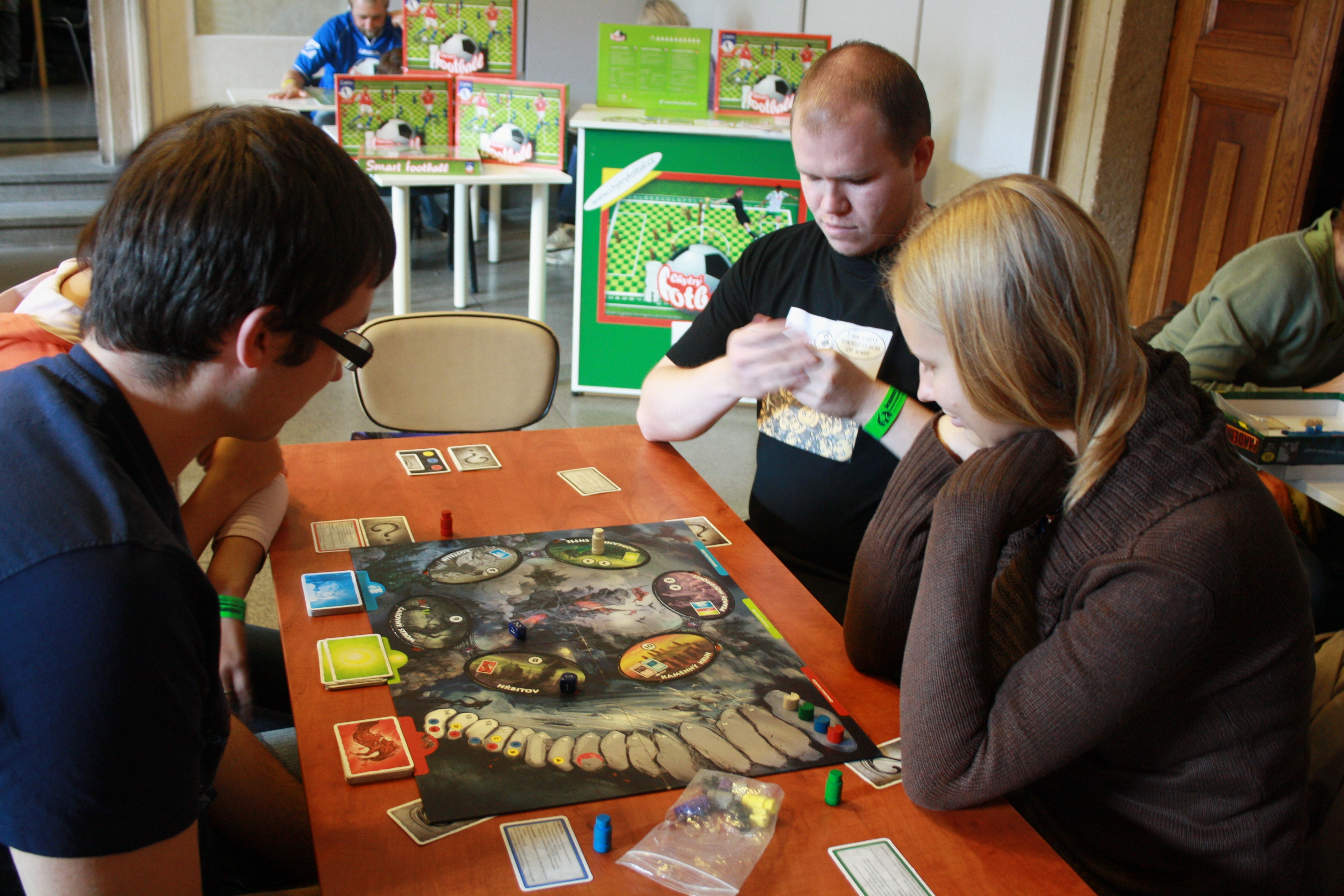 Deskohraní 2012 - Lovci noci